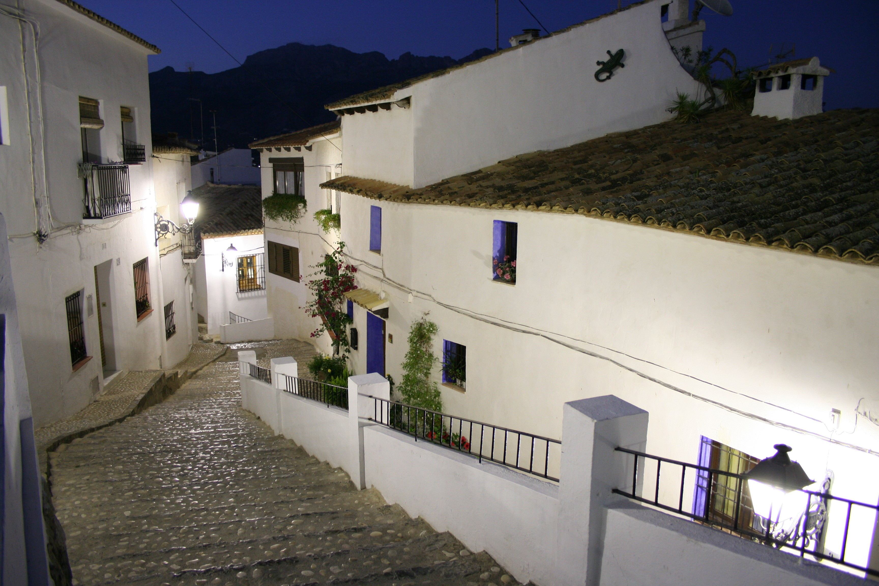 Calle con escalera empedrada, en Altea (Alicante, España)